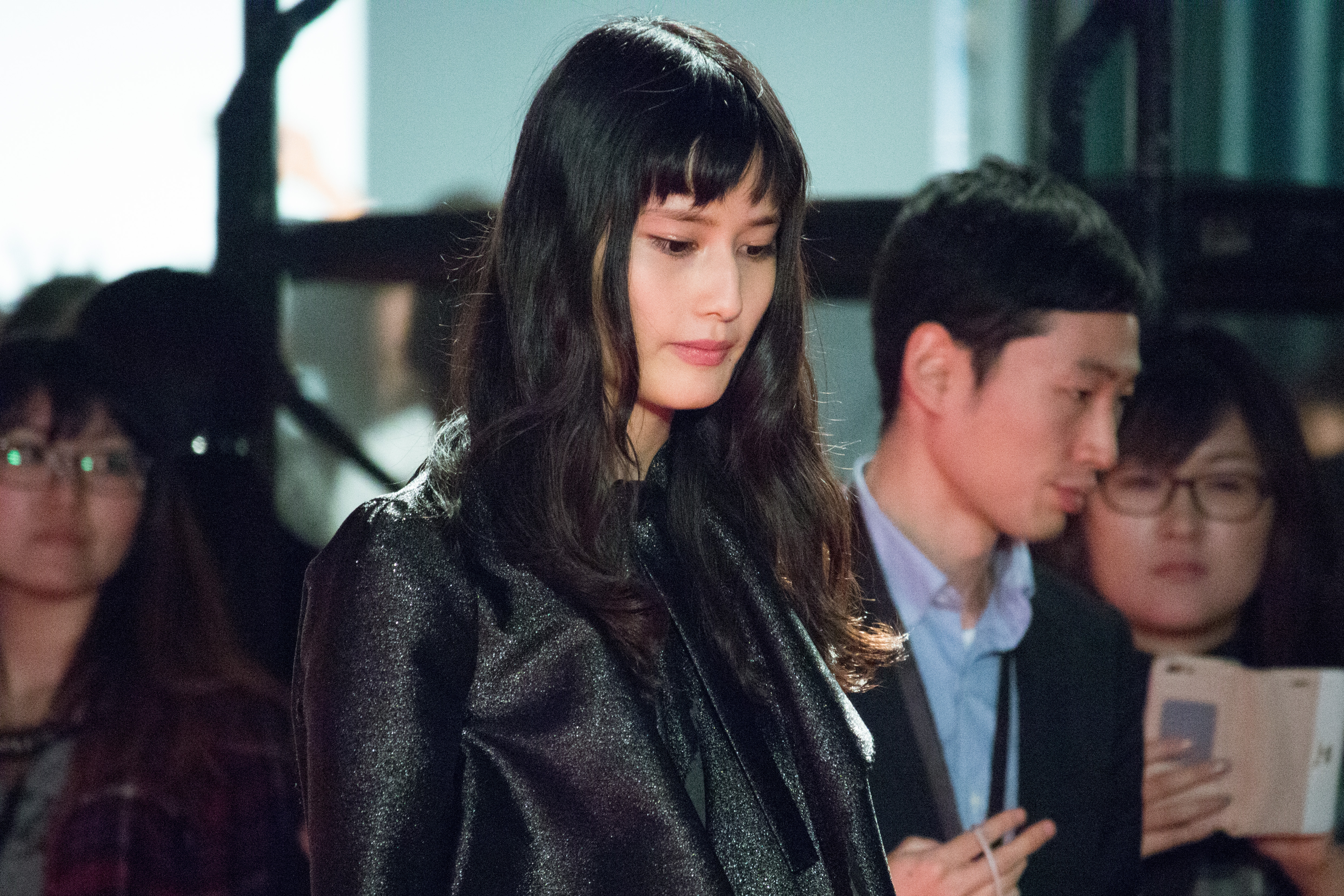 第28回 東京国際映画祭 オープニングセレモニー 橋本愛 (残穢 -住んではいけない部屋-)